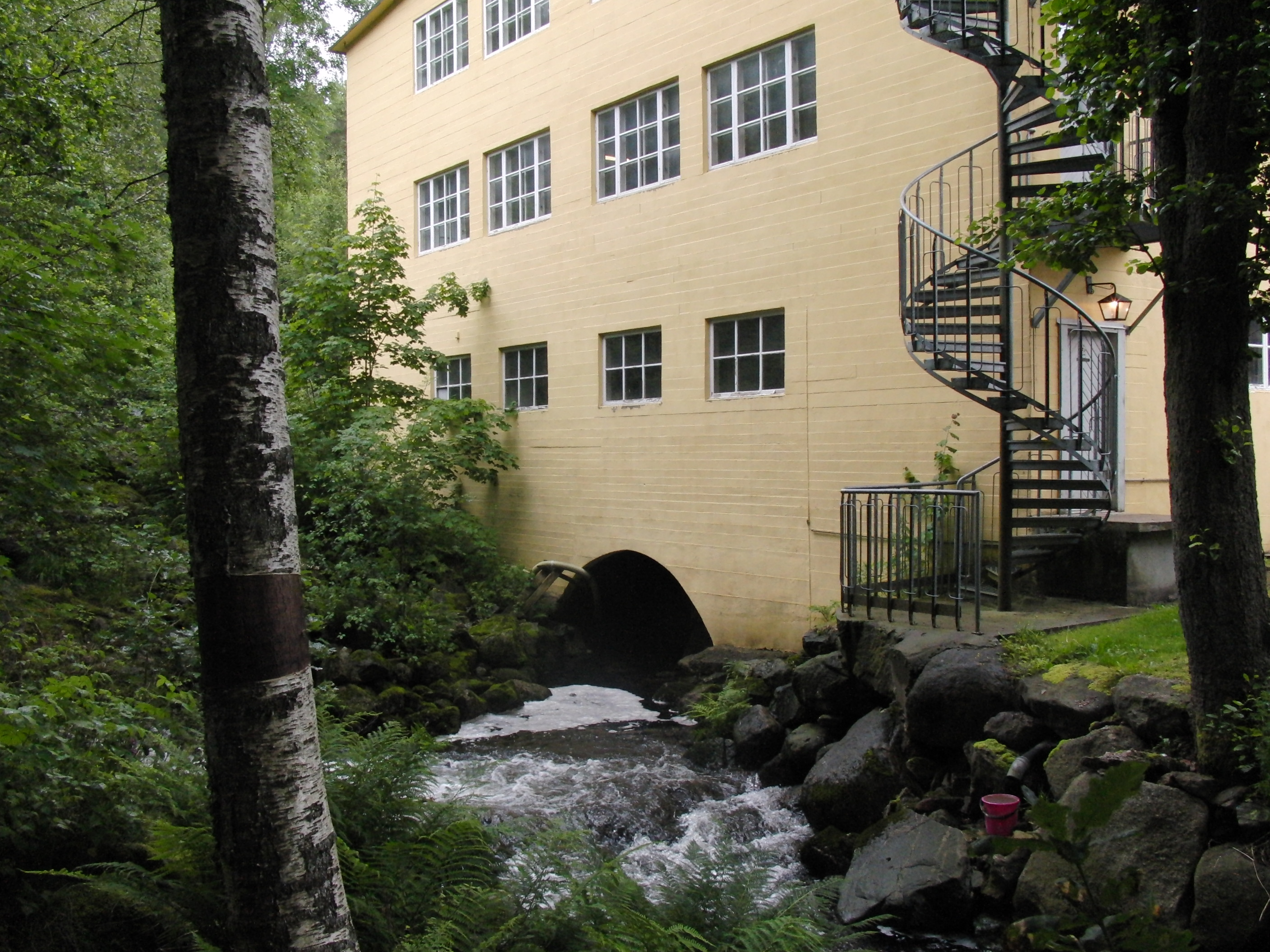 Sjølingstad Uldvarefabrikk kraftverk